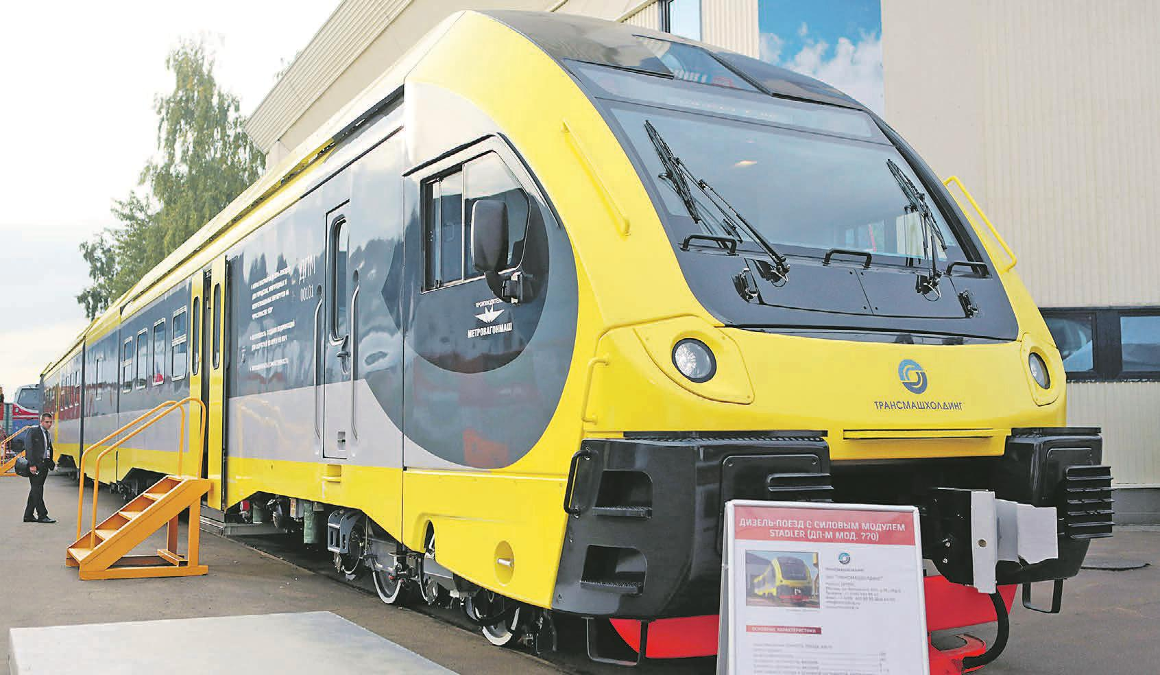 Дизель-поезд ДПМ-001 на выставке ЭКСПО-1520 на территории депо кольца ВНИИЖТ